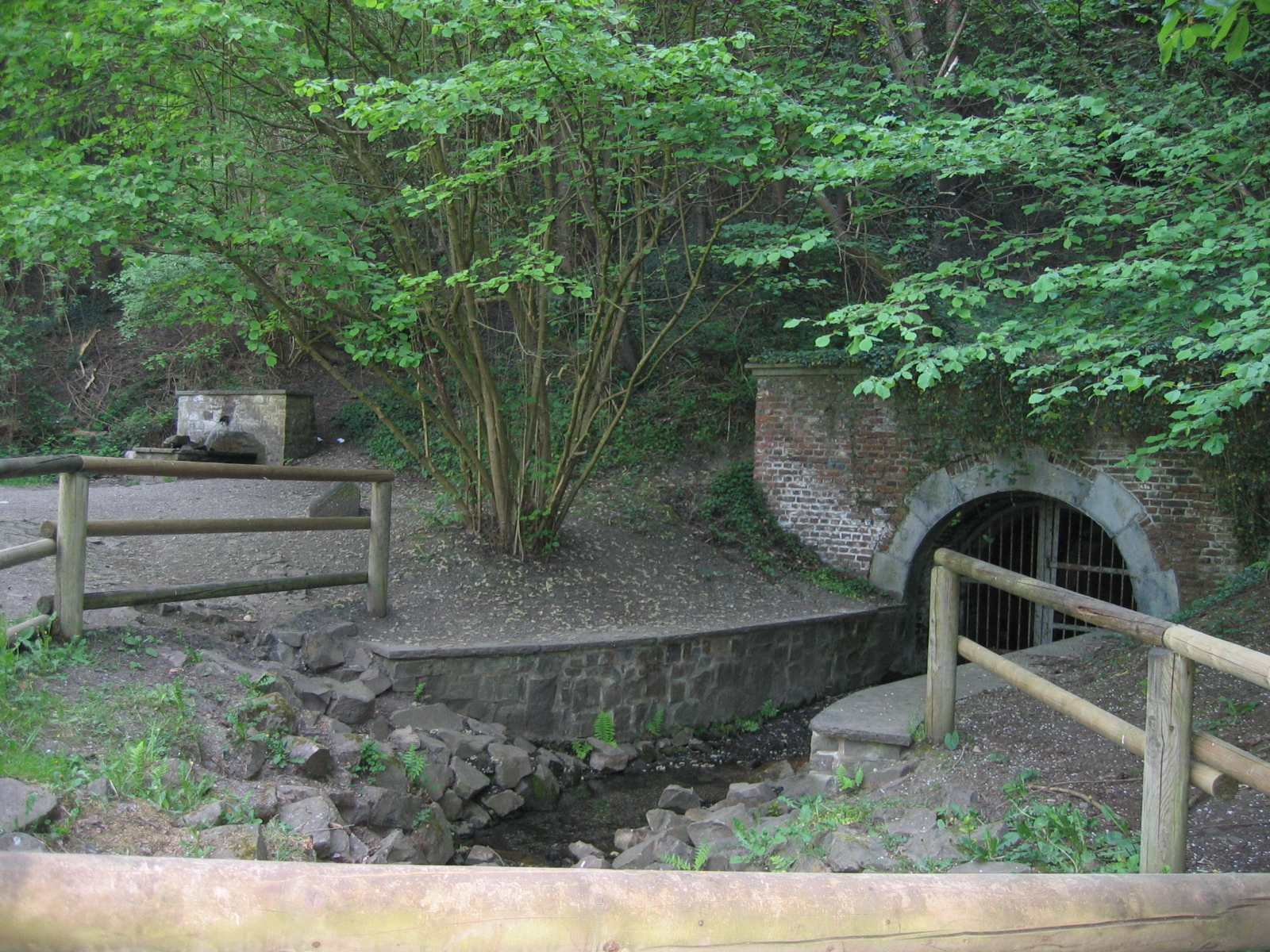 Förderstollen. Grubenwasser Stollen Grube Gouley/Würselen im Wurmtal.